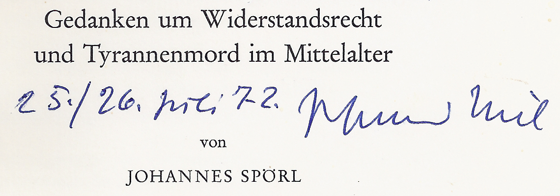 Johannes Spörl. Aus der Widmung seiner "Gedanken um Widerstandsrecht und Tyrannenmord im Mittelalter" an mich, veröffentlicht in "Widerstandsrecht". Wissenschaftliche Buchgesellschaft, Darmstadt 1972